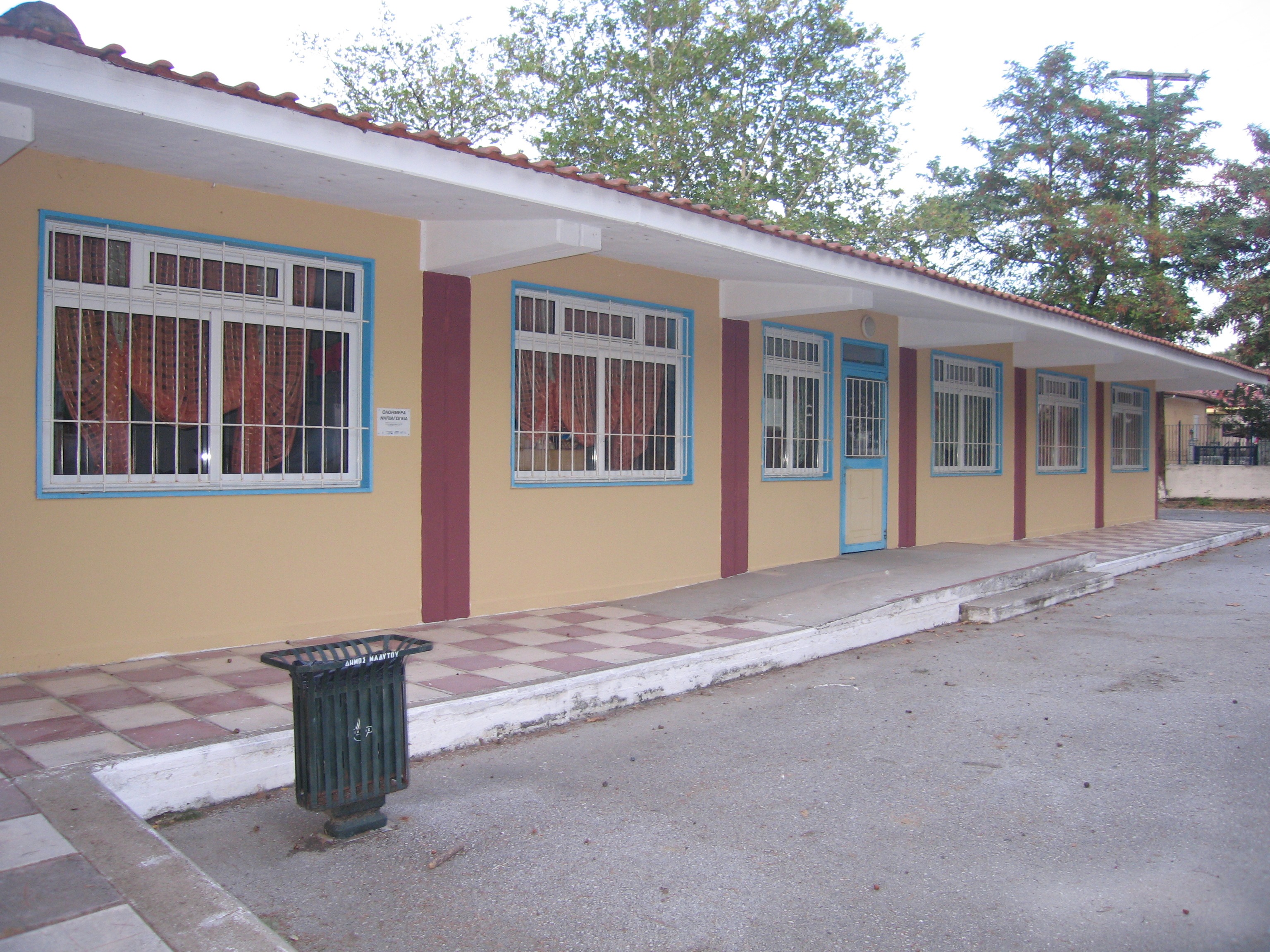 Νηπιαγωγείο Νέας Μαδύτου